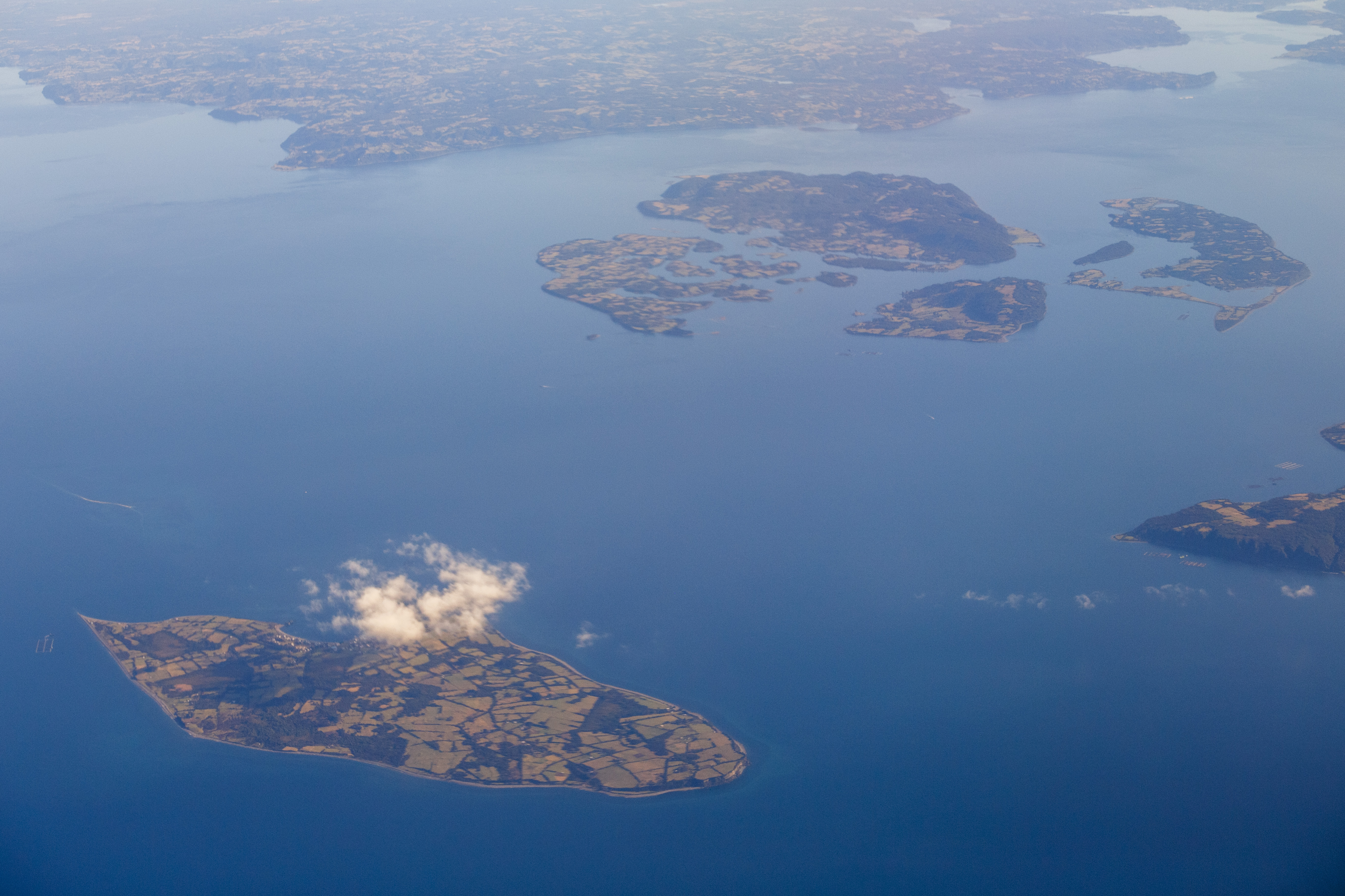 Isla Tac e islas Chauques, archipiélago de Chiloé, Chile.